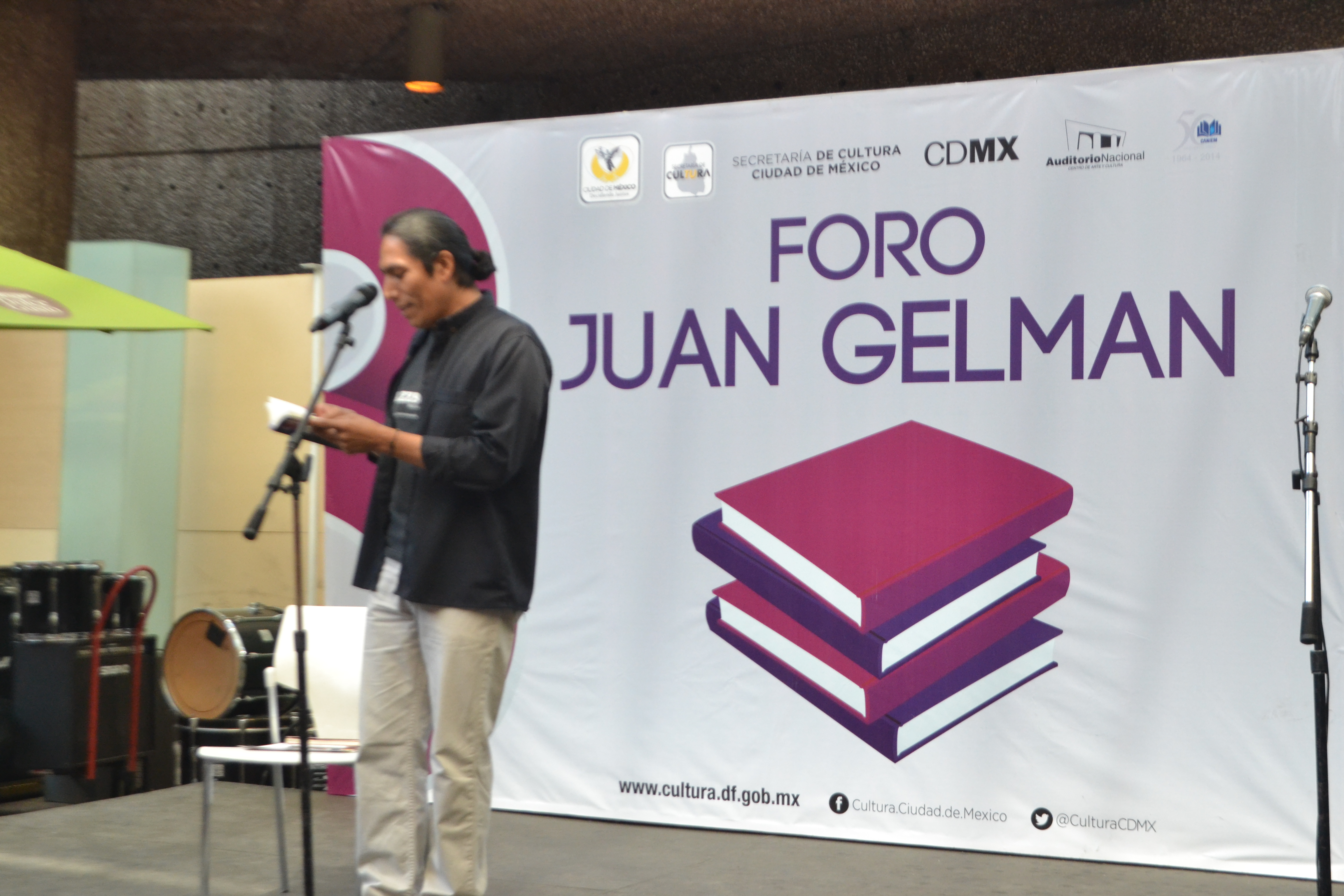 Orador de poesia en el 8º Gran remate de libros